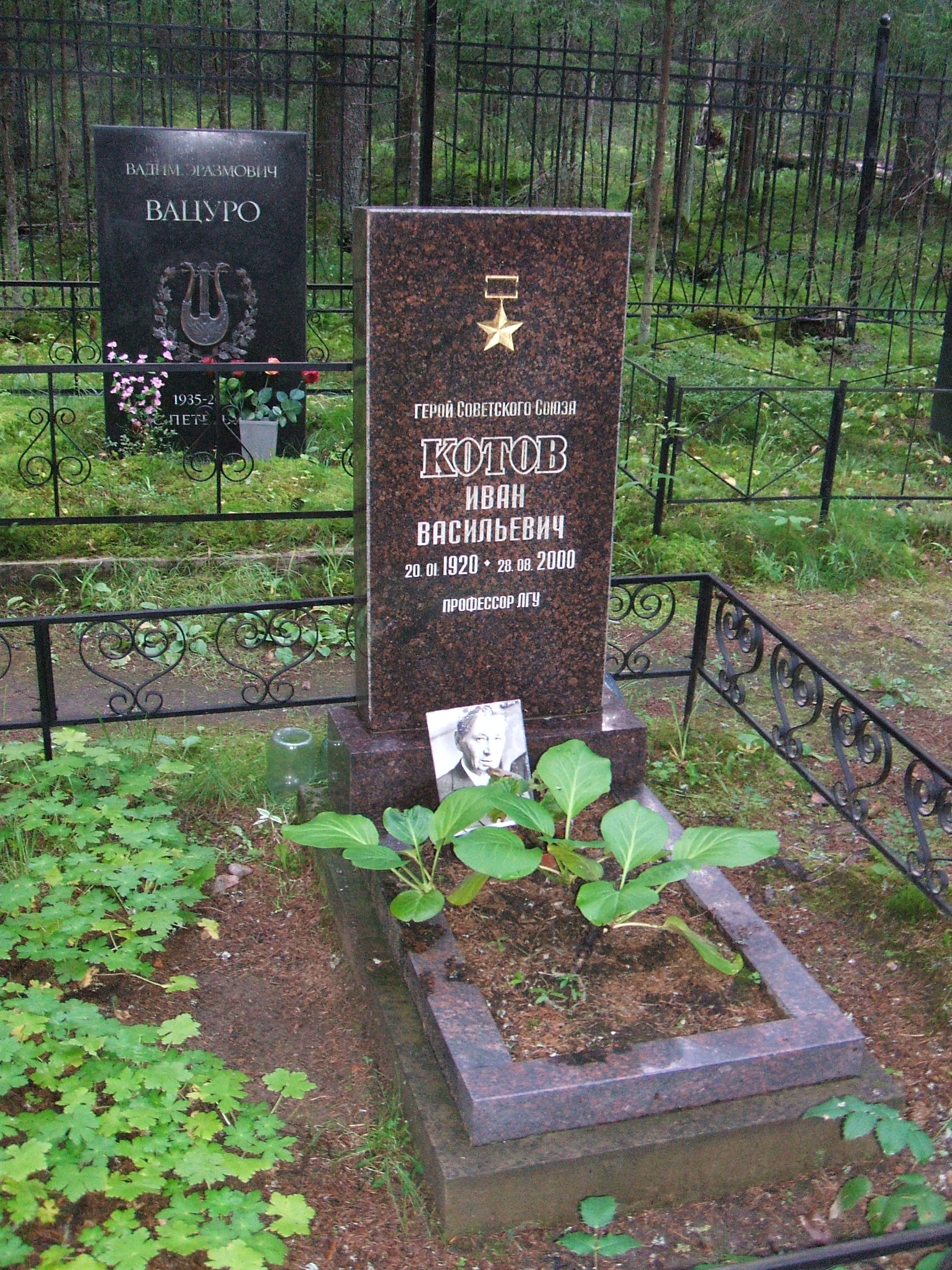 могила на комаровском кладбище